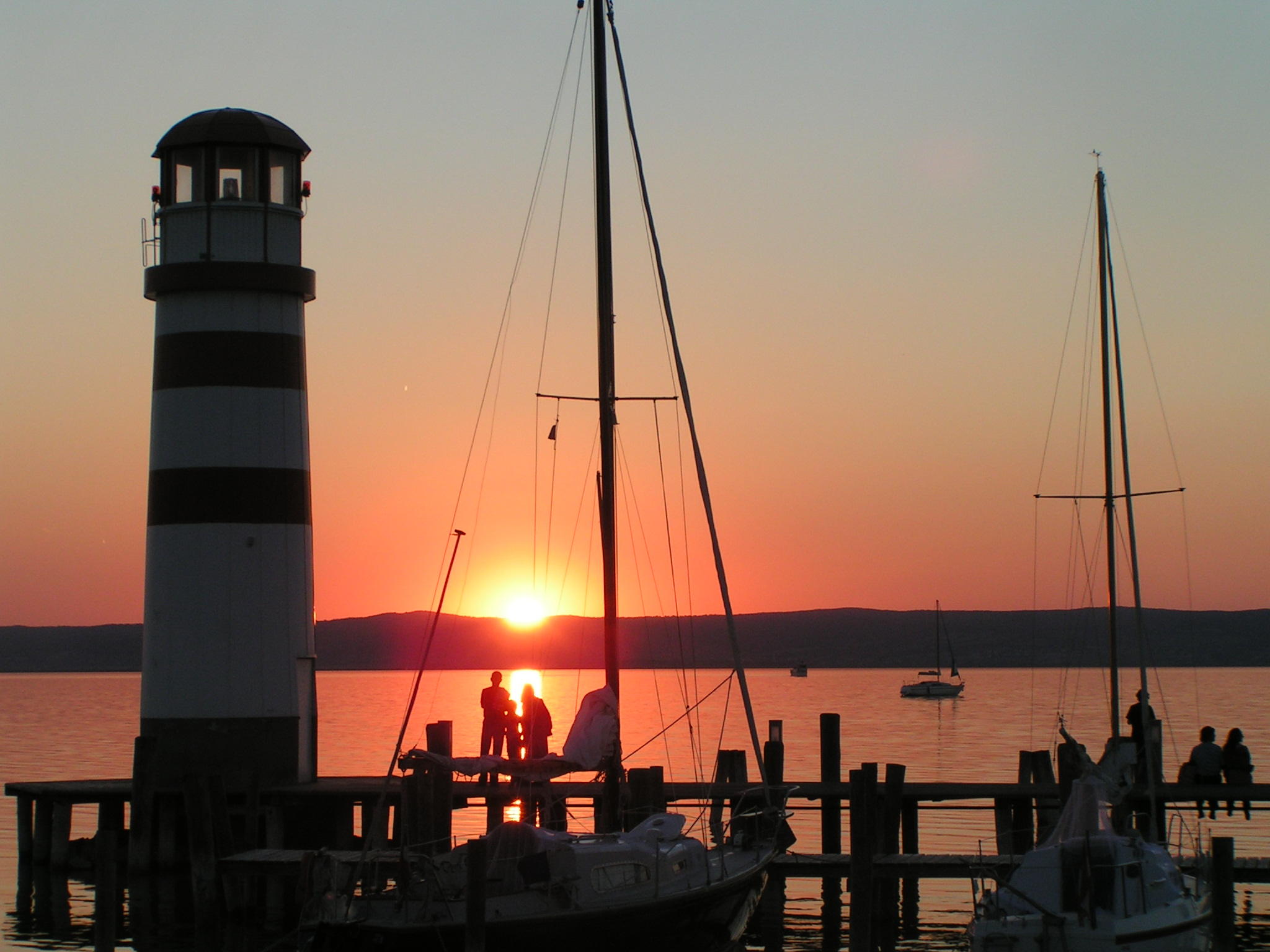 Sonnenuntergang am Hafen Podersdorf am Neusiedler See